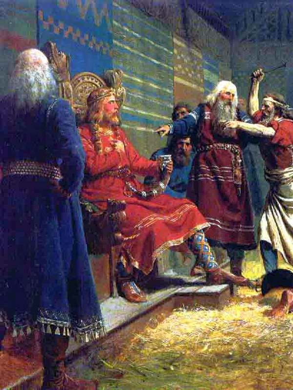 Håkon den Gode og bøndene ved blotet på Mære